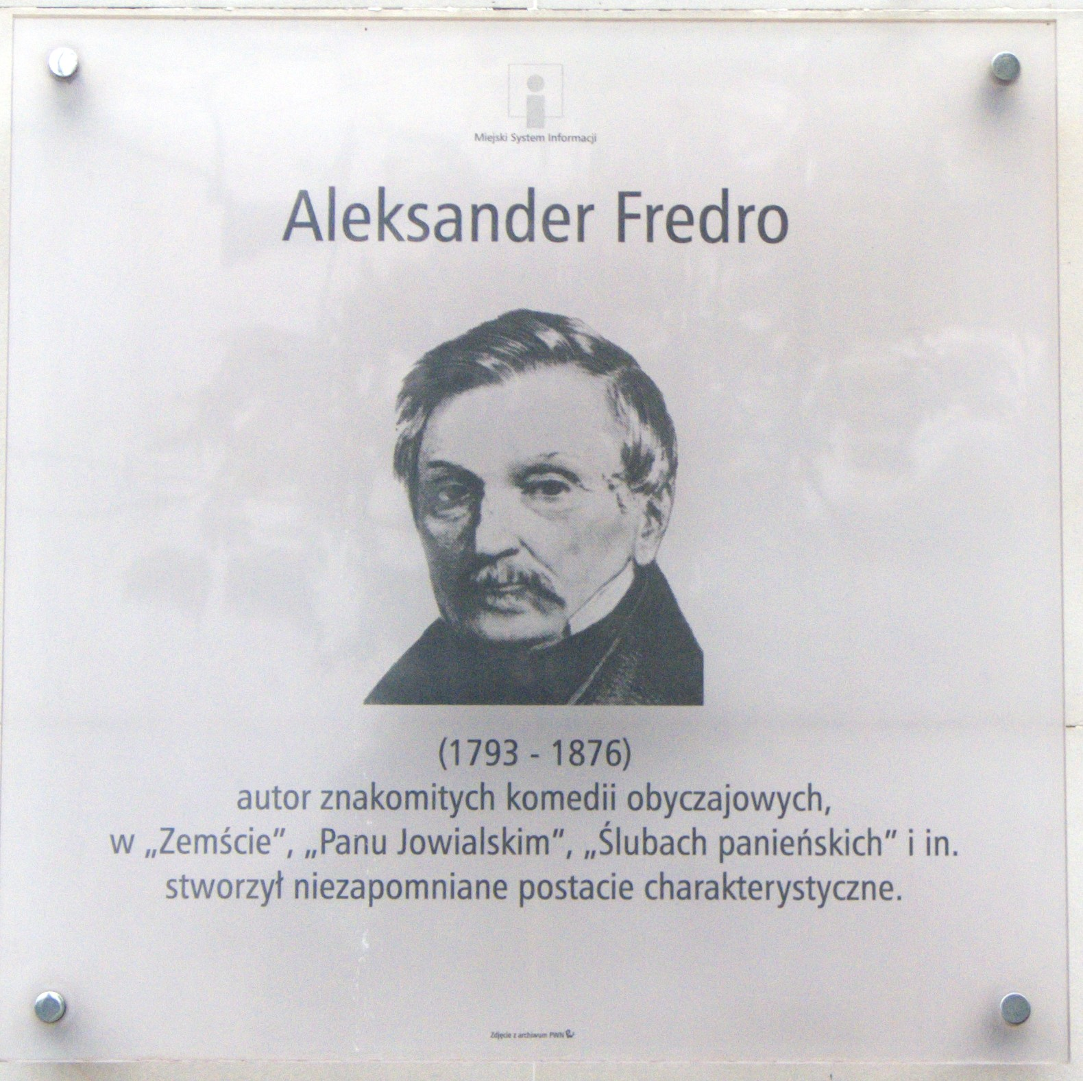 Tablica MSI na budynku przy ul. Aleksandra Fredry w Warszawie.